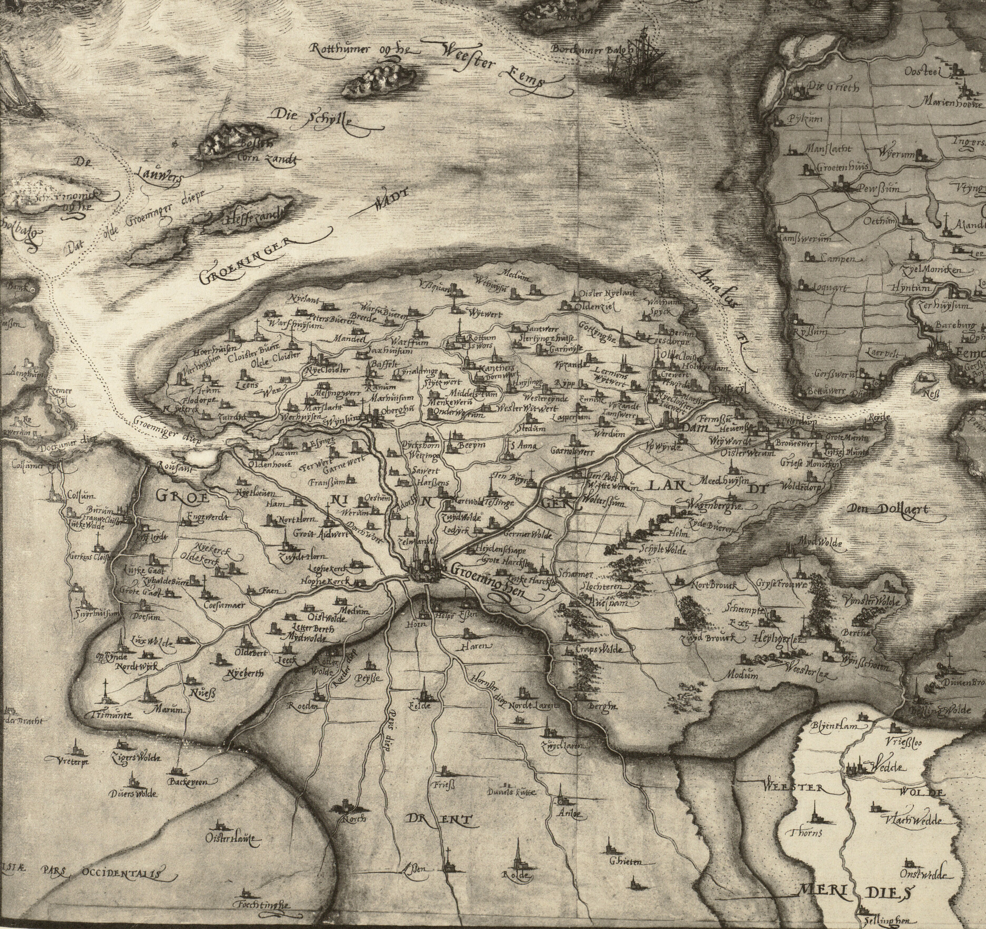 Kaart van Christiaan Sgroten van Groningen (Groeningen Landt). Uitsnede van deze grotere kaart. Gemaakt na 1558. Uitgegeven in atlas in 1573/1582. Facsimile-uitgave van de manuscriptkaarten te Brussel.